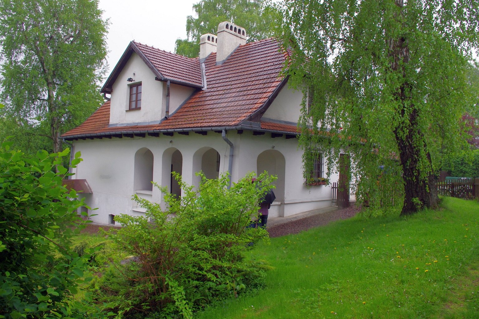 Muzeum Młodej Polski